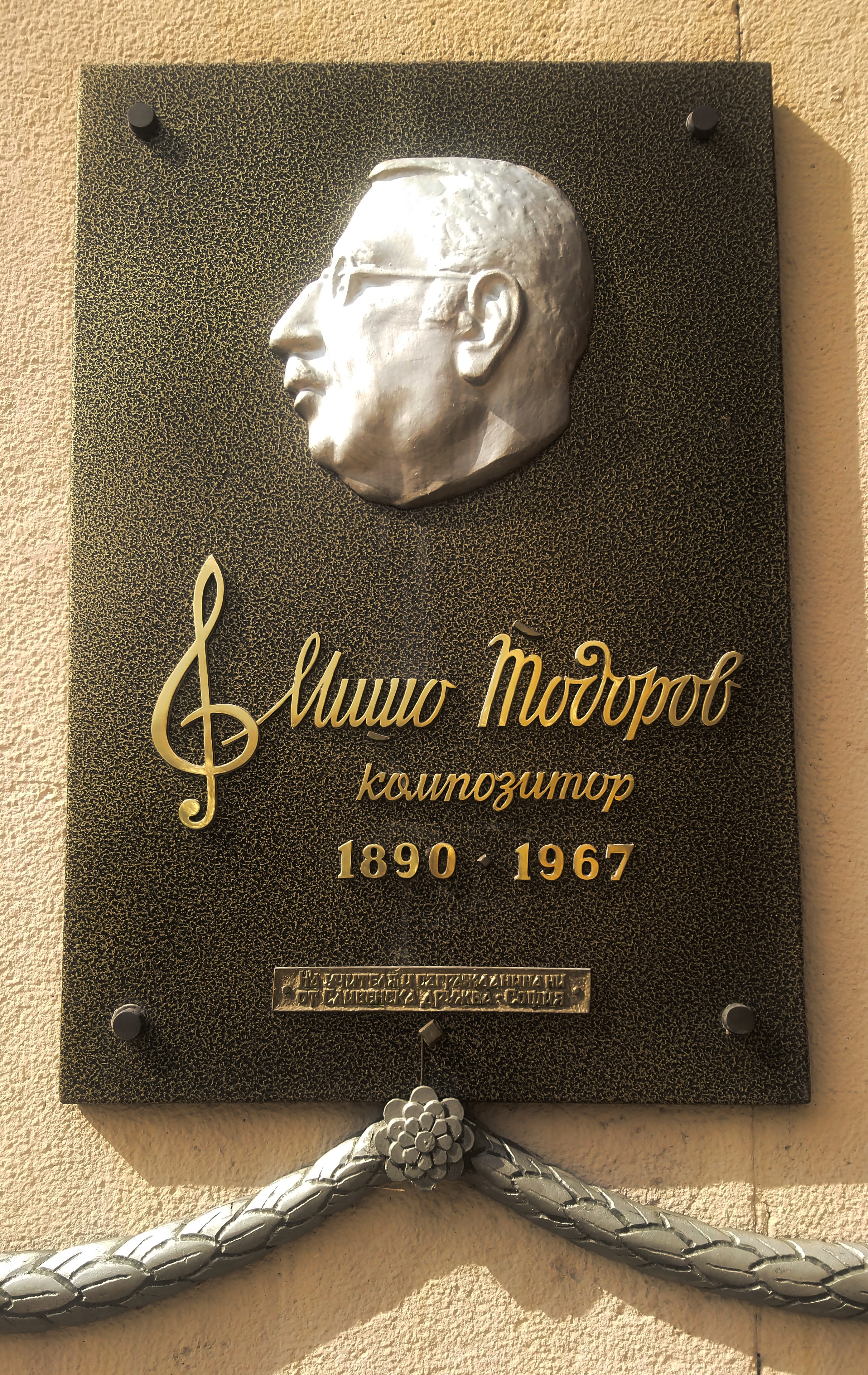 Паметна плоча на композитора Мишо Тодоров в центъра на Сливен